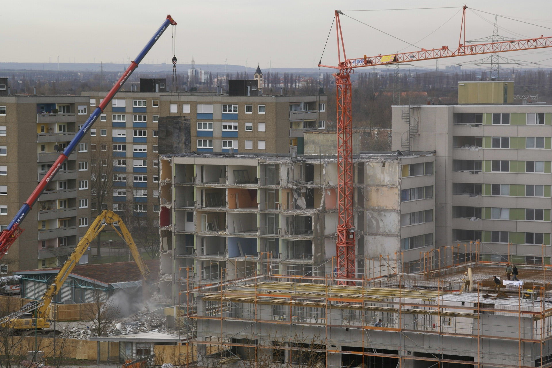 Rückbau einer Hochhauskette in Ludwigshafen am Rhein